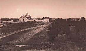 Alta Gracia en la época colonial